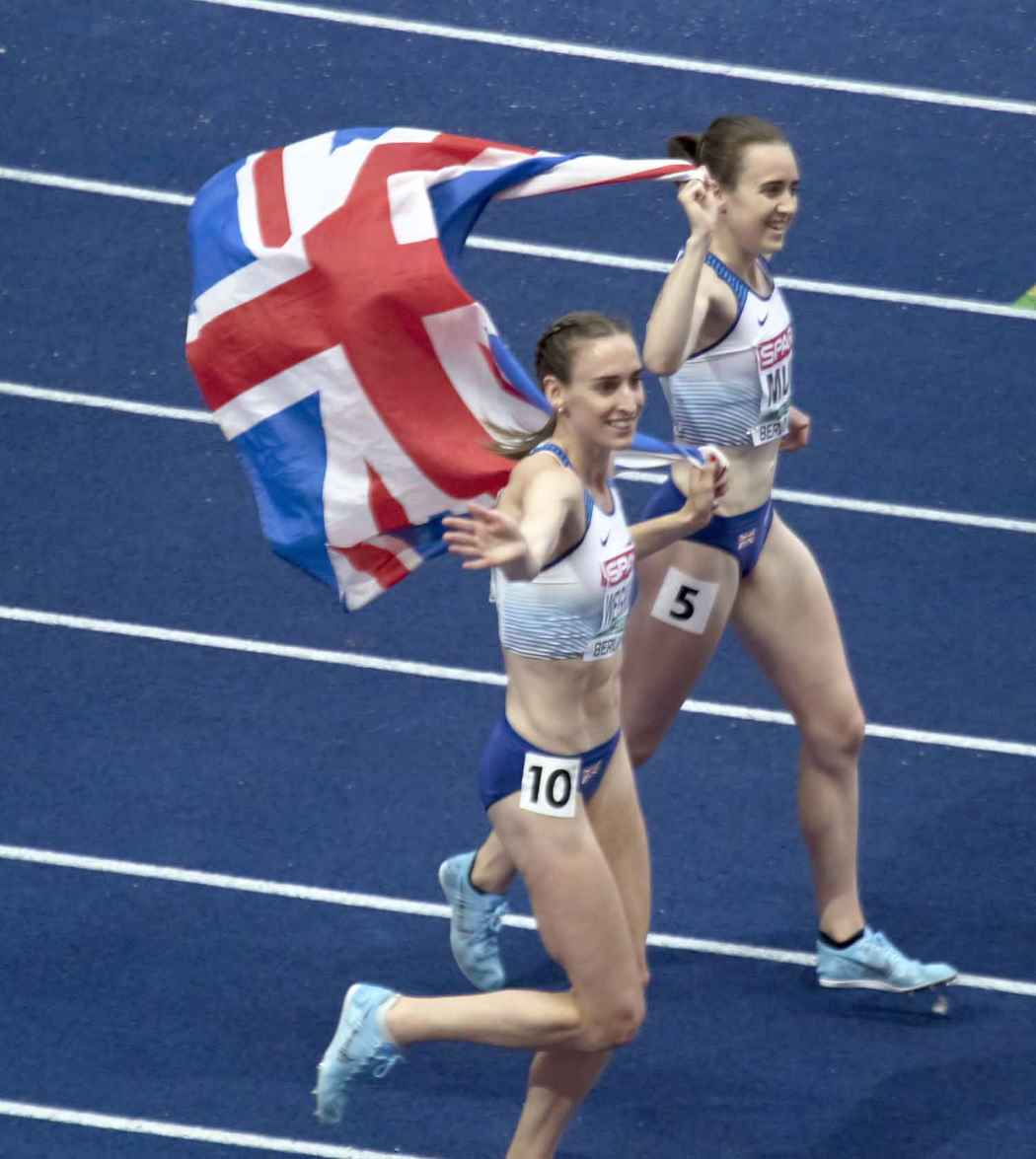 EKB52988 1500m dames ereronde